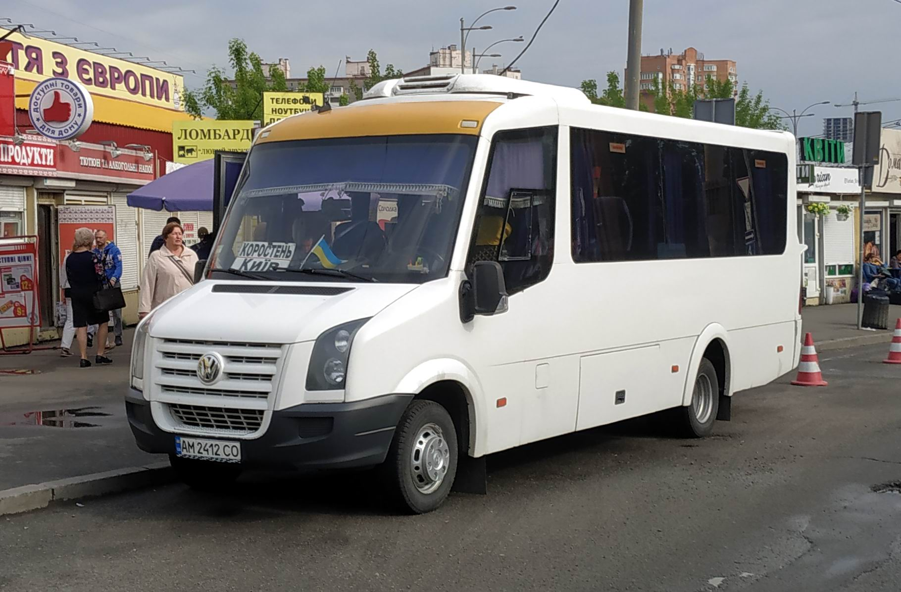 Автобус МТК А308.51 Sirius на шасси Volkswagen Crafter производства компании "Автотехнология". Автобус работает на линии Киев-Коростень. Киев, май 2019 г.